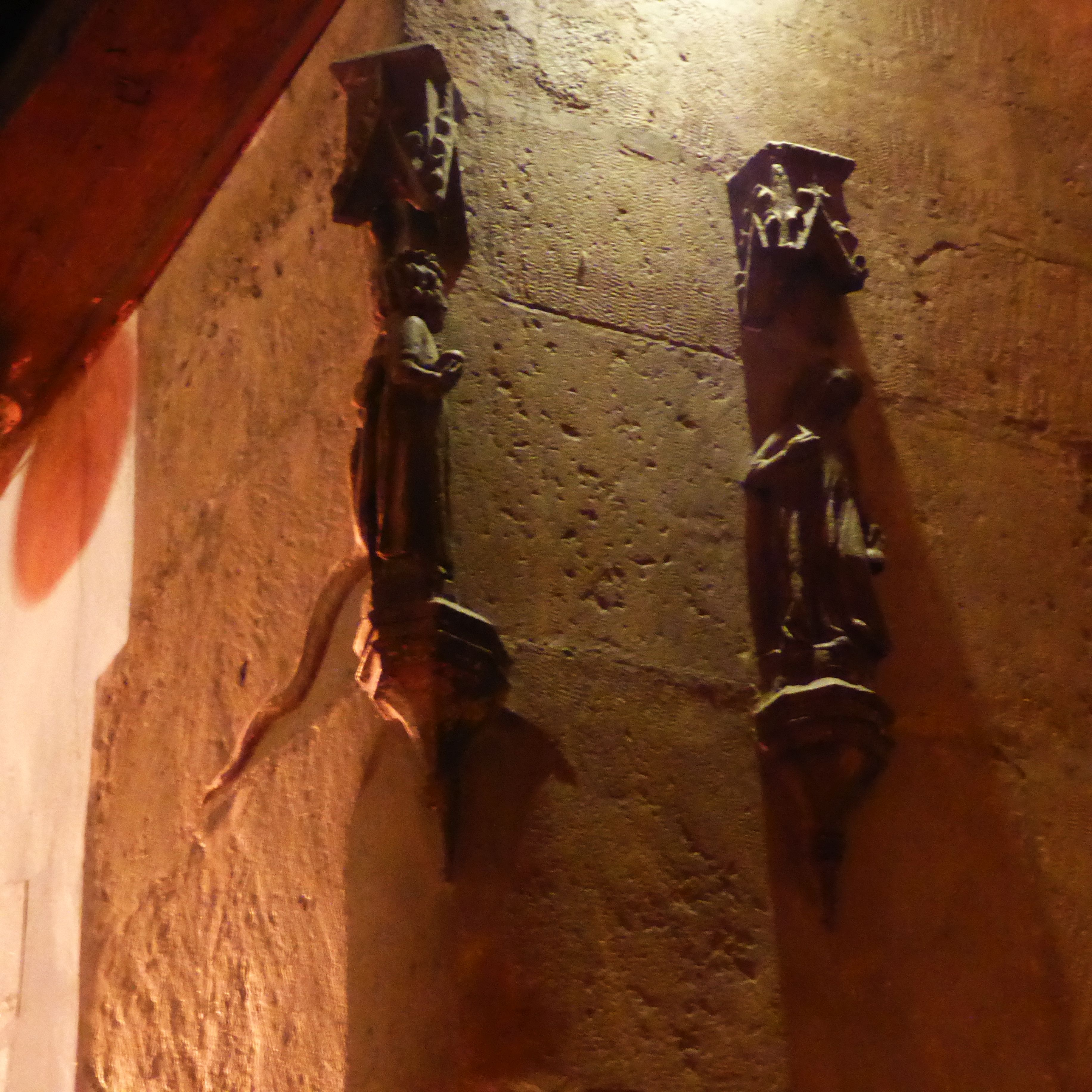 Figurenensemble Haus Heuport